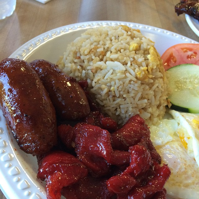 SavorFilipino continues... Toci/Long-silog #FilipinoFood #Breakfast #tocino #longanisa